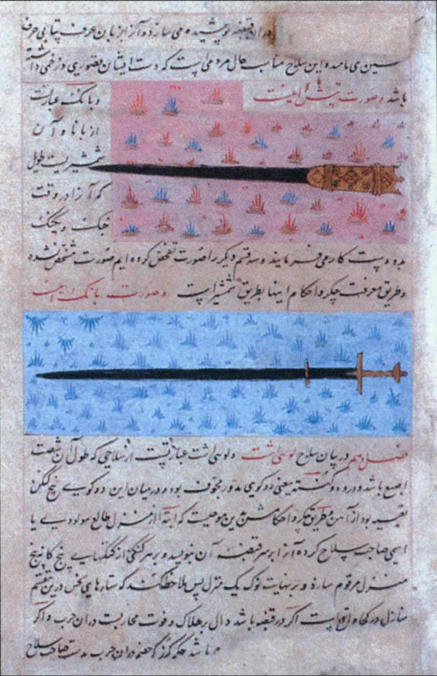 Изображение мечей пата и мел путтах бемох. Трактат Нуджум ал-улум.